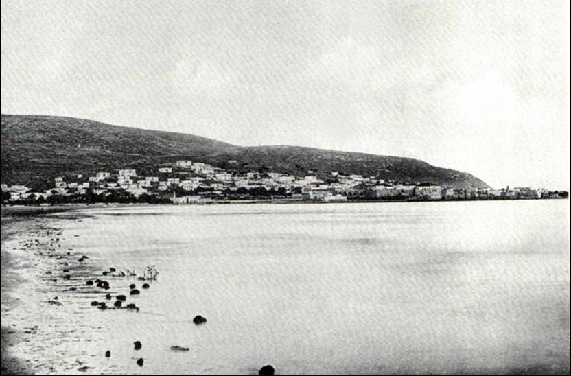 Historical images of Haifa תמונות היסטוריות של חיפה מבט על חיפה מחוף שמן, תמונה מ- 1887